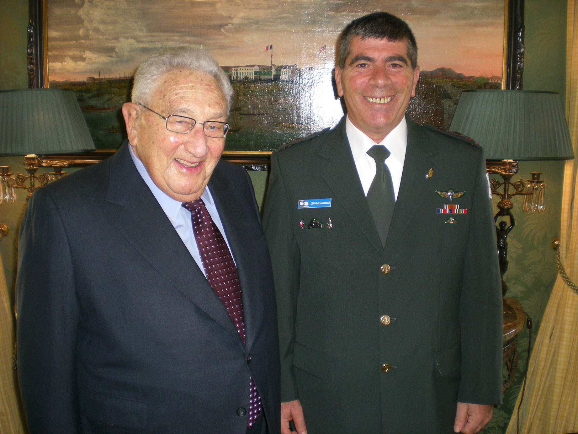 November 20, 2010. IDF Chief of the General Staff. Lt. Gen. Gabi Ashkenazi, met yesterday (Friday) with Dr. Henry Kissinger for a breakfast at his New York home. Dr. Kissinger and Lt. Gen. Ashkenazi shared their opinions and assessments regarding the situation in the Middle East. Featured as "Photo of the Day" on November 20, 2010. הרמטכ"ל, רא"ל גבי אשכנזי, נועד אתמול (שישי) עם הד"ר הנרי קיסינג'ר במסגרת ארוחת בוקר שקיימו השניים בביתו שבניו יורק. קיסינג'ר ואשכנזי החליפו דעות והערכת מצב על המתרחש במזרח התיכון. התמונה פורסמה כ"תמונת היום" בתאריך נובמבר 20, 2010.